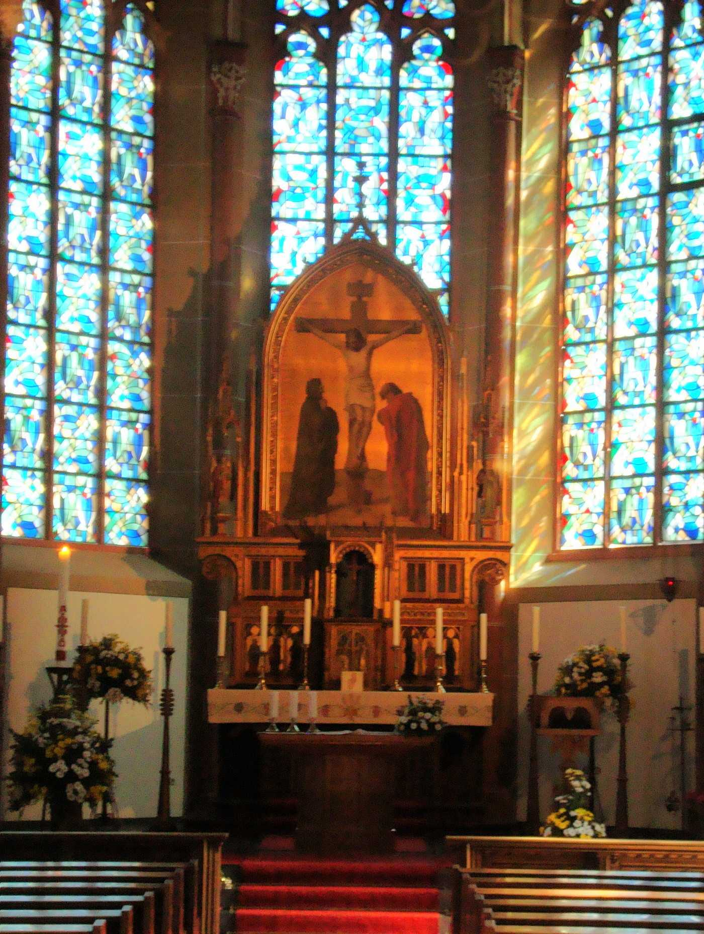 Heinrich Lauenstein, Kreuzigung 1873, Düsseldorf-Heerdt, St. Benediktus, Hochaltar